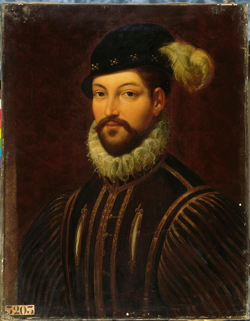 Copy from an original kept at the Château de Beauregard; commissioned by Louis-Philippe in 1834